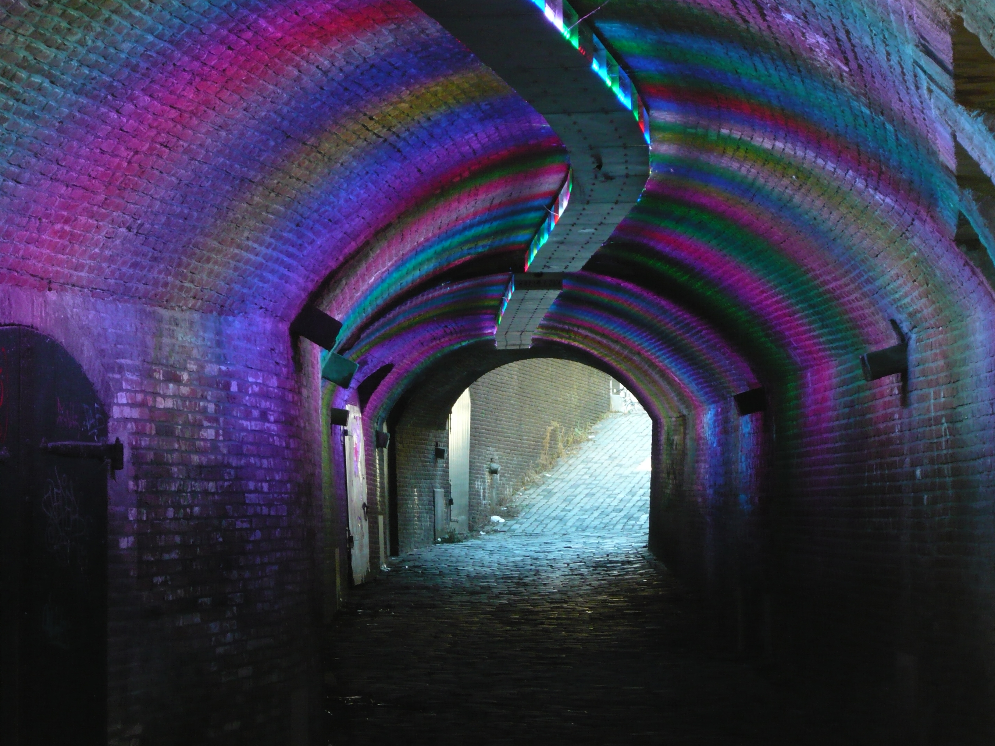 Wed naar de Ganzenmarkt vanaf de werf van de Oudegracht in Utrecht. 16″ N, 5° 07′ 08.54″ E